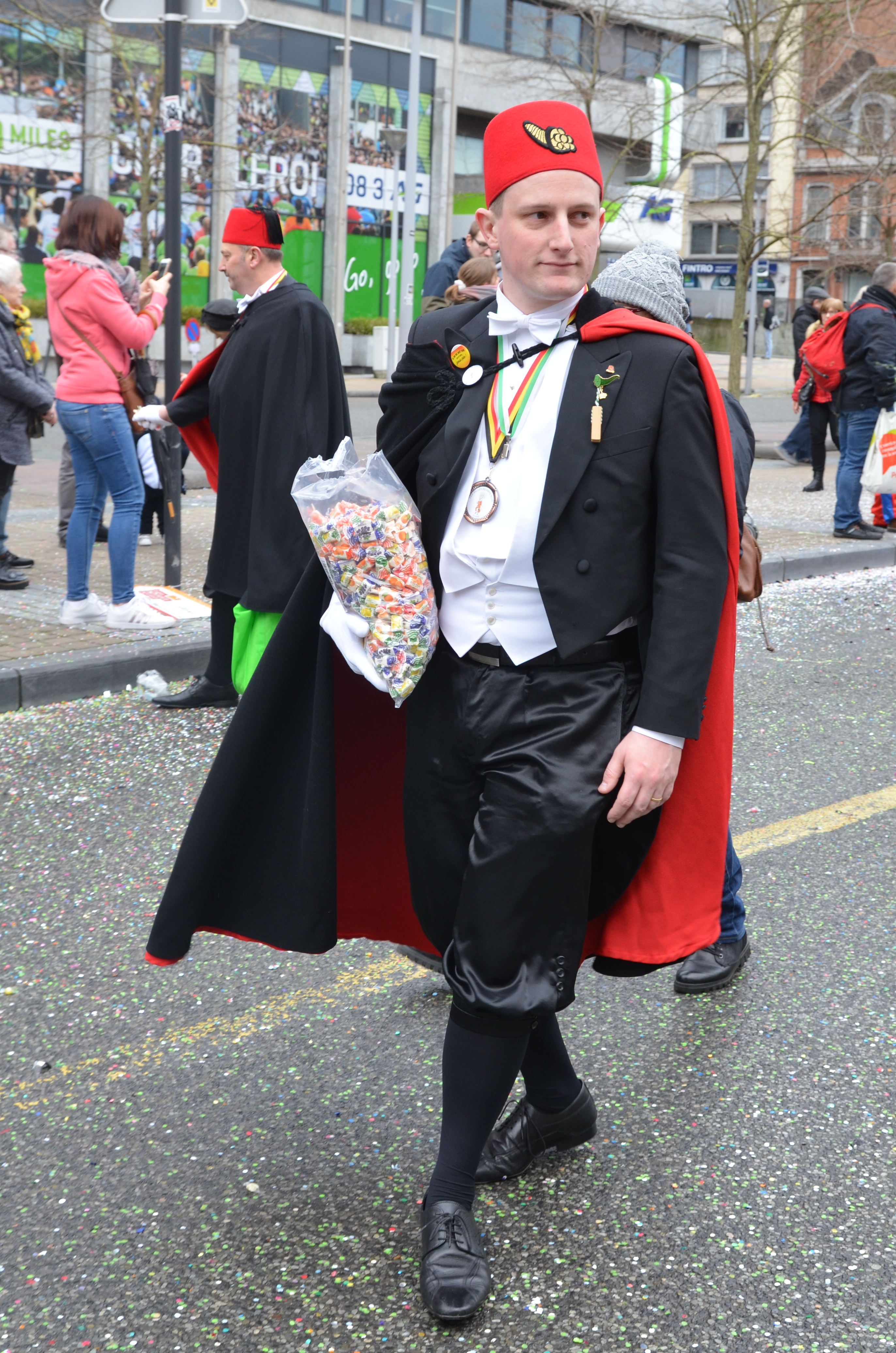 Les Climbias de Lodelinsart participant au carnaval de Charleroi en 2020.